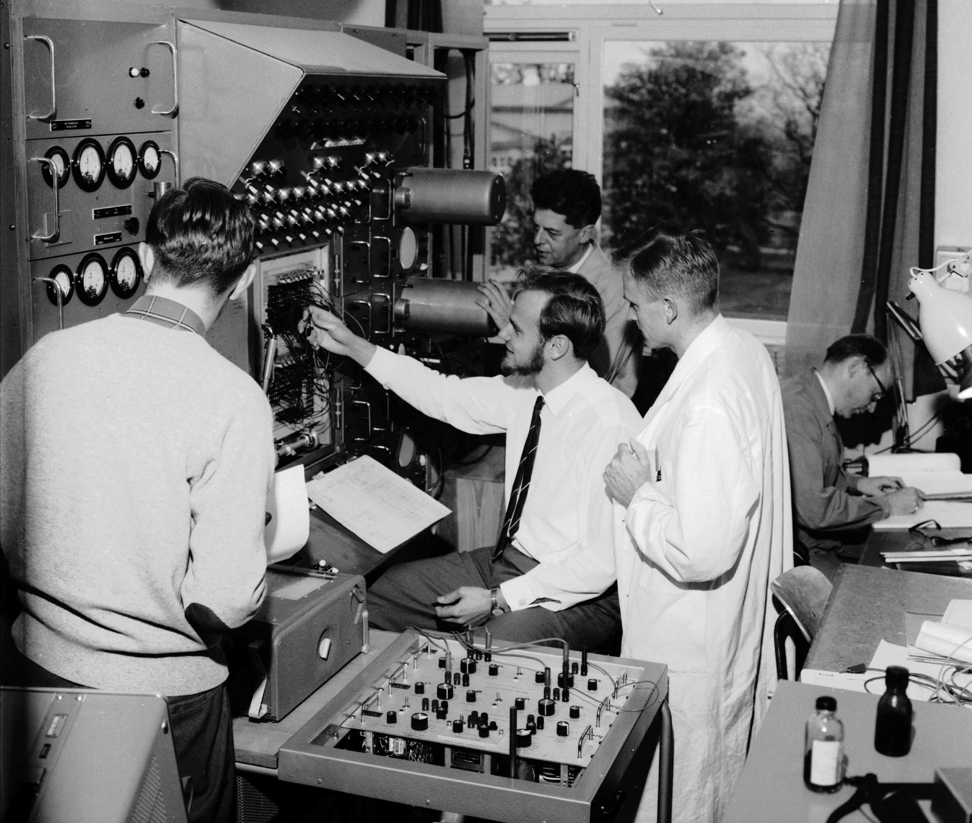 DIANA, en analog datamaskin, en av Norges to første, utviklet ved NTH i professor Jens Glad Balchens miljø